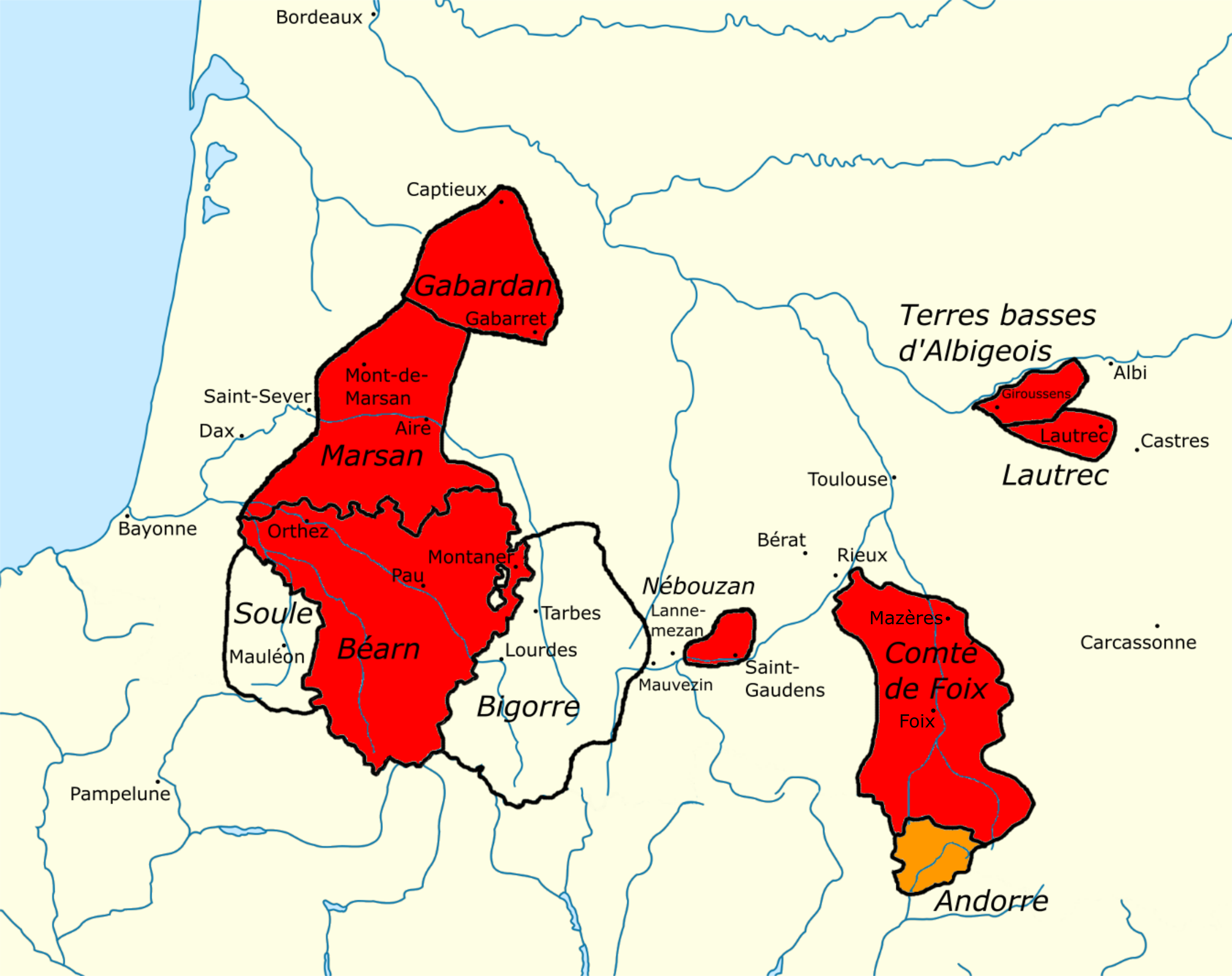 Les territoires de Gaston III de Foix-Béarn, dit Fébus, à sa mort en 1391. En rouge les territoires dont il dispose seul lors du début de son règne, en orange Andorre dont il est co-seigneur.